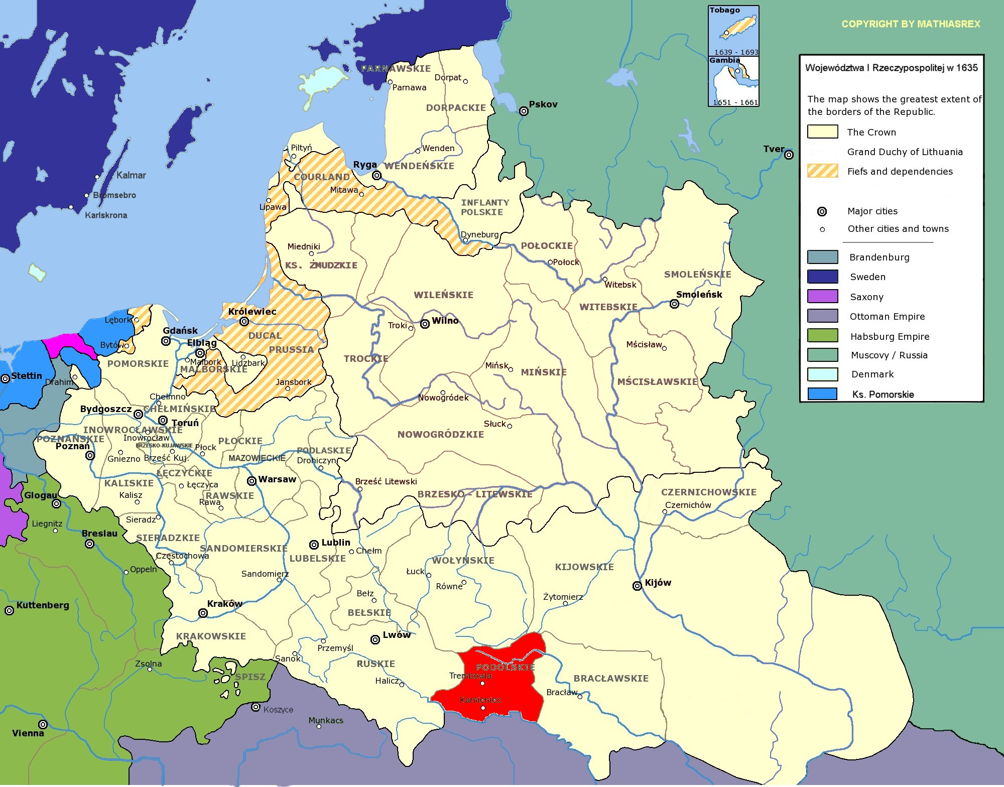 województwo podolskie w I Rzeczypospolitej A modified copy of Image:Rzeczpospolita voivodships.png by Halibutt